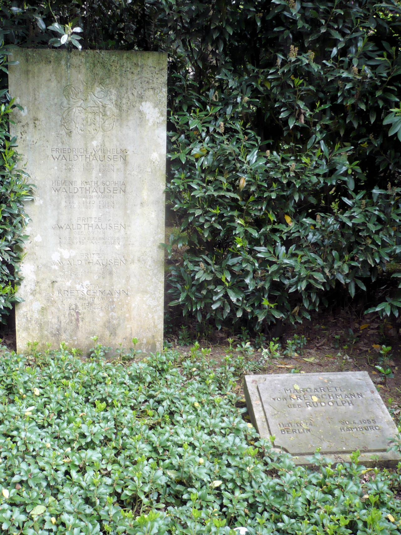 Ein altes Waldthausen-Grabmal auf dem Friedhof Bredeney in Essen